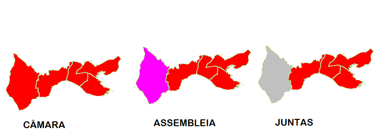 Mapa ilustrativo do partido mais votado nas eleições de 2017 em Setúbal